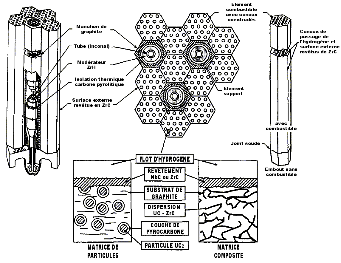 Deux formes de combustible testées dans le programme Rover/NERVA.